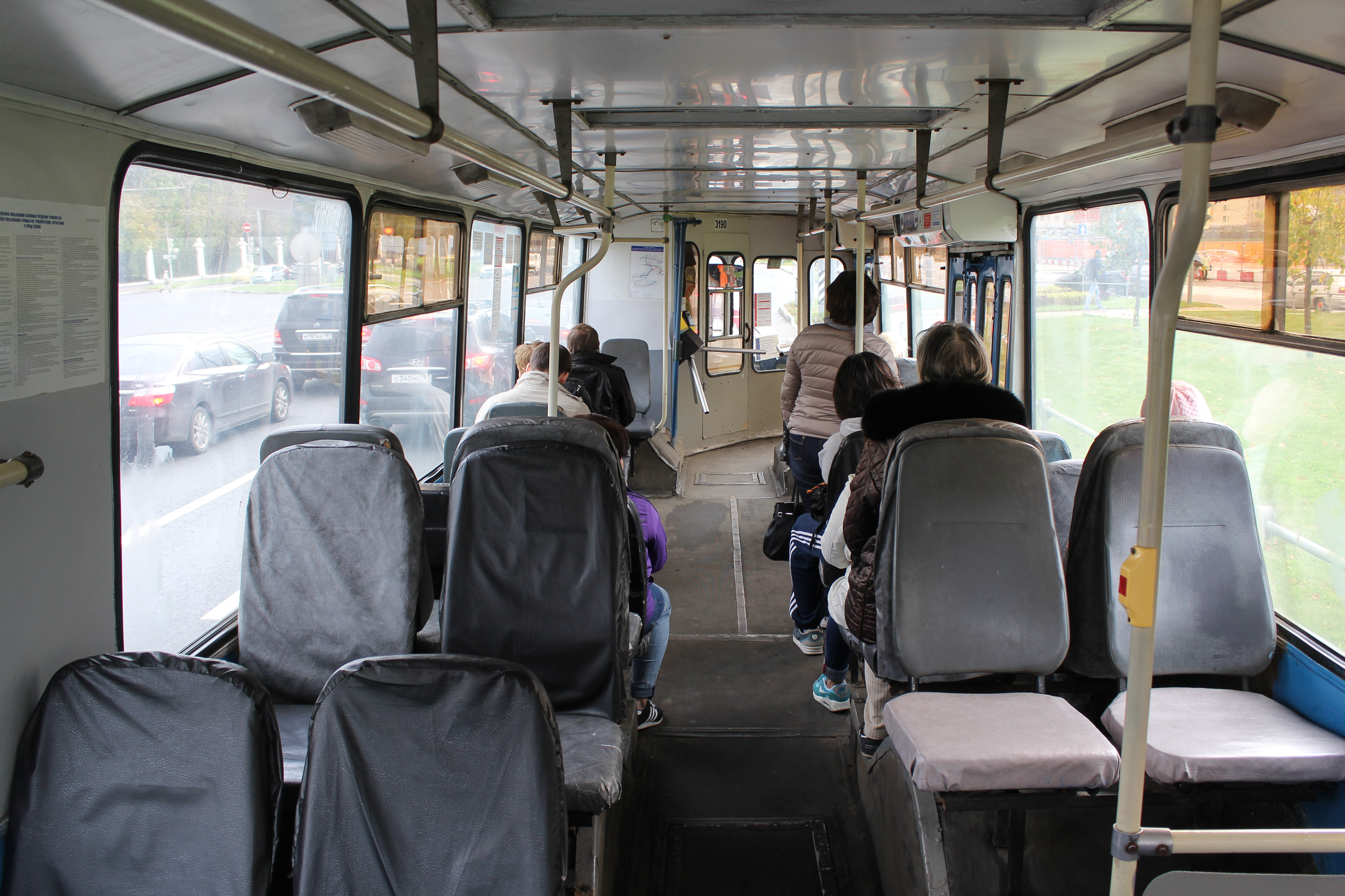 Интерьер троллейбуса ЗиУ-682гм1